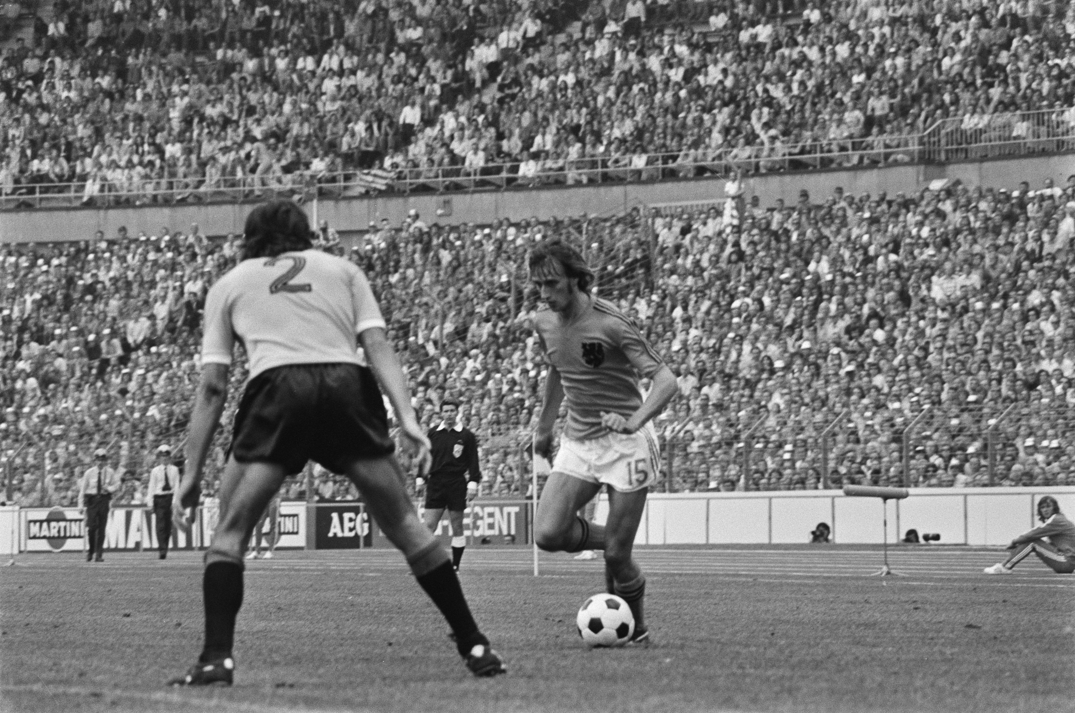 Collectie / Archief : Fotocollectie Anefo Reportage / Serie : [ onbekend ] Beschrijving : Wereldkampioenschap voetbal 1974; Nederland tegen Uruguay 2-0; spelmomenten Datum : 15 juni 1974 Trefwoorden : sport, voetbal, wereldkampioenschappen Fotograaf : Verhoeff, Bert / Anefo Auteursrechthebbende : Nationaal Archief Materiaalsoort : Negatief (zwart/wit) Nummer archiefinventaris : bekijk toegang 2.24.01.05 Bestanddeelnummer : 927-2601